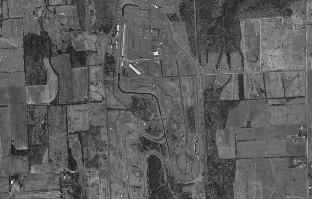 Image satellite du Watkins Glen International